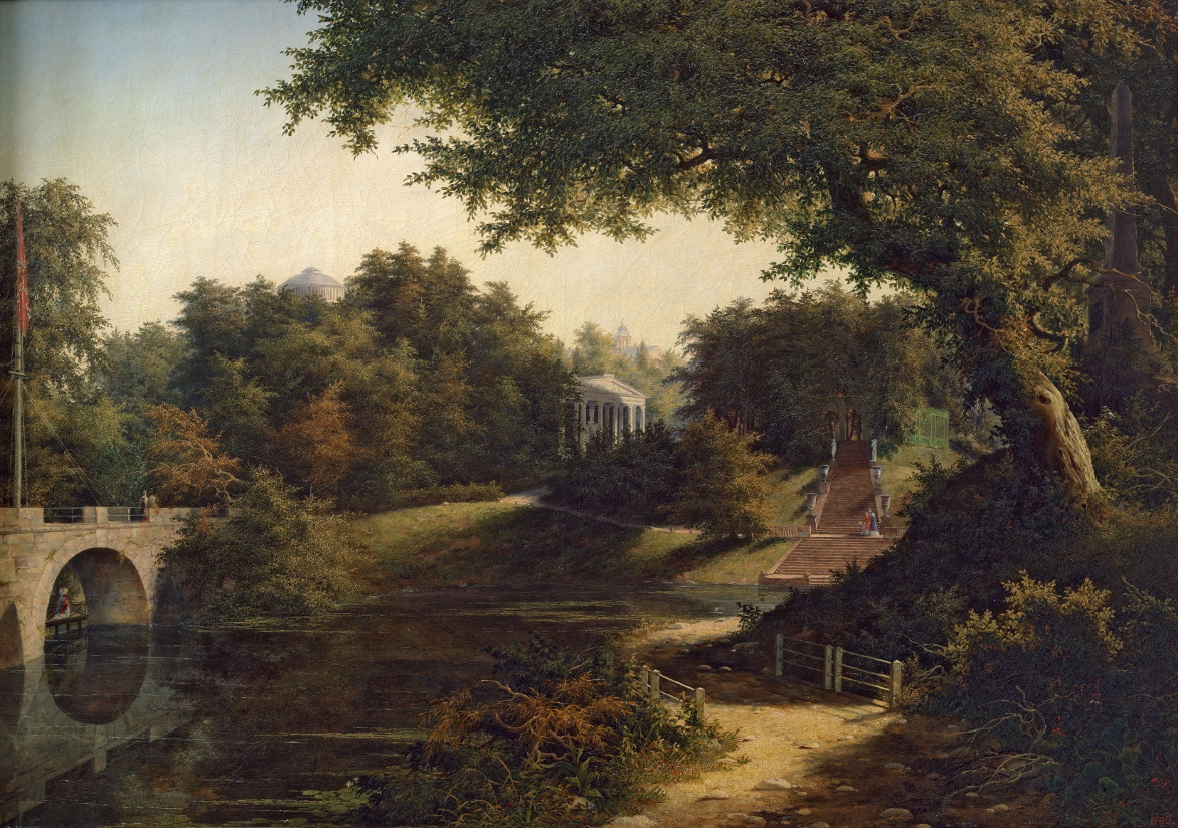 Вид в Павловском парке. Холст, масло. 89,5 х 125,5. У нижнего края картины справа подпись и дата: А. Волосковъ 1845. Ранее приписывалась Митхаилу Ивановичу Лебедеву. Лебедев. Картина исключена из числа работ М. И. Лебедева на основании стилистического и технологического исследований. В ходе последнего обнаружены подпись и дата, которые удалось прочесть: А. Волосковъ 1845. Известно, что Волосков копировал в „Художественных классах" пейзажи работы Лебедева (РГИА*, фонд 789, опись 14, дело 11013, лист 12). Протокол Атрибуционного совета № 3 (47) от 02.11.2007. (Сообщение Н. Н. Крылова). На картине изображён вид на Большой дворец в Павловске со стороны парка Мариенталь. Справа обелиск основанию Павловска; на втором плане Павильон трех граций; в центре мраморная скульптура „Три грации".